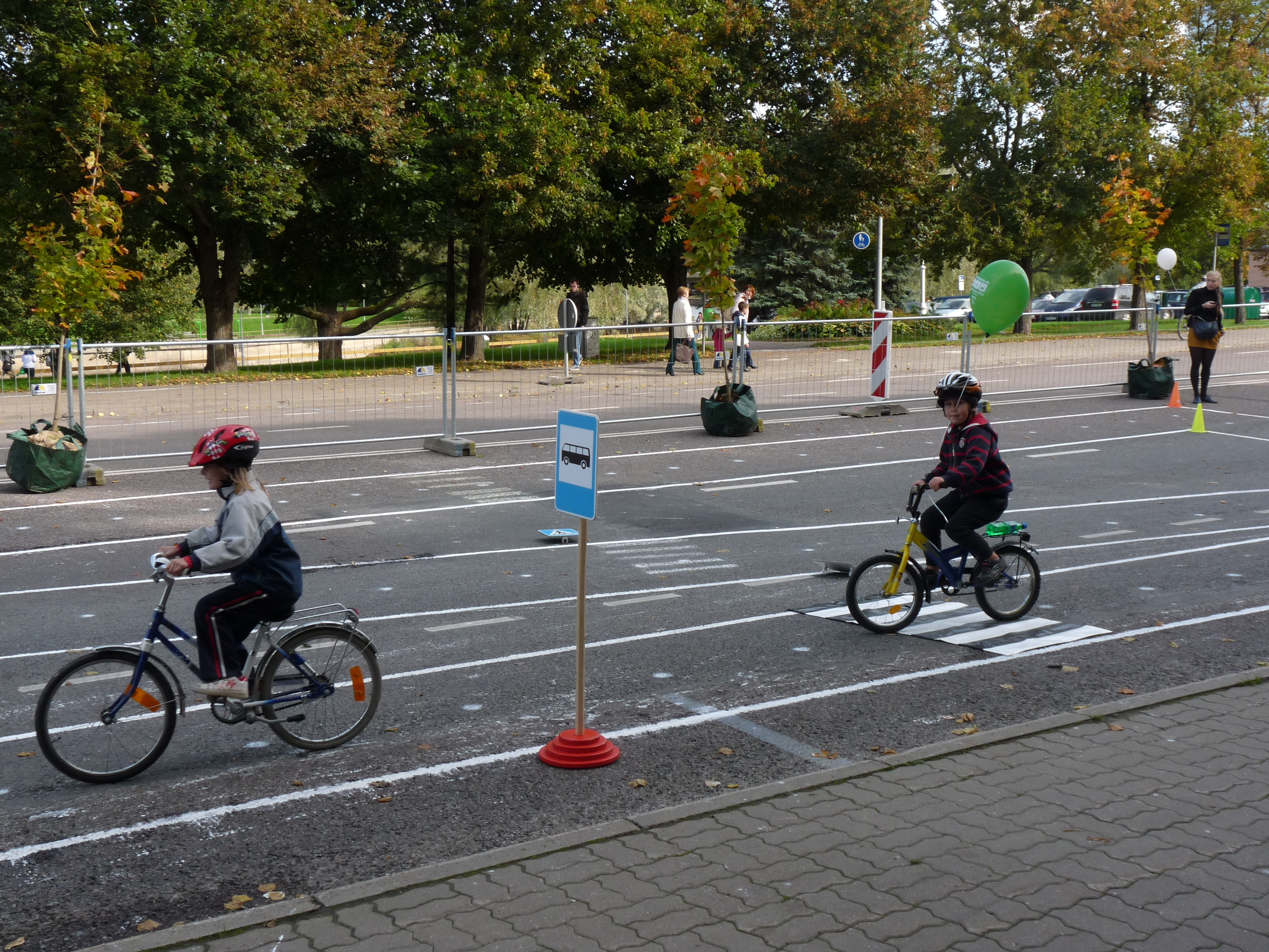 Noored jalgratturid liikluslinnakus Vabaduse puiesteel Tartu linna tervisepäeval, 22. september 2012